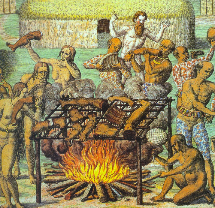 Theodor de Bry: Canibais, século XVI.